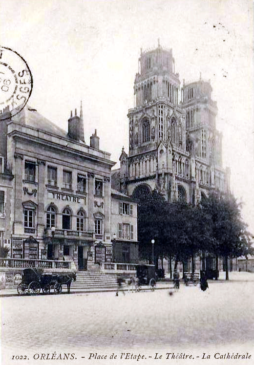 Ancien théâtre d'Orléans et cathédrale Sainte-Croix, place de l'étape, Orléans, Loiret, France